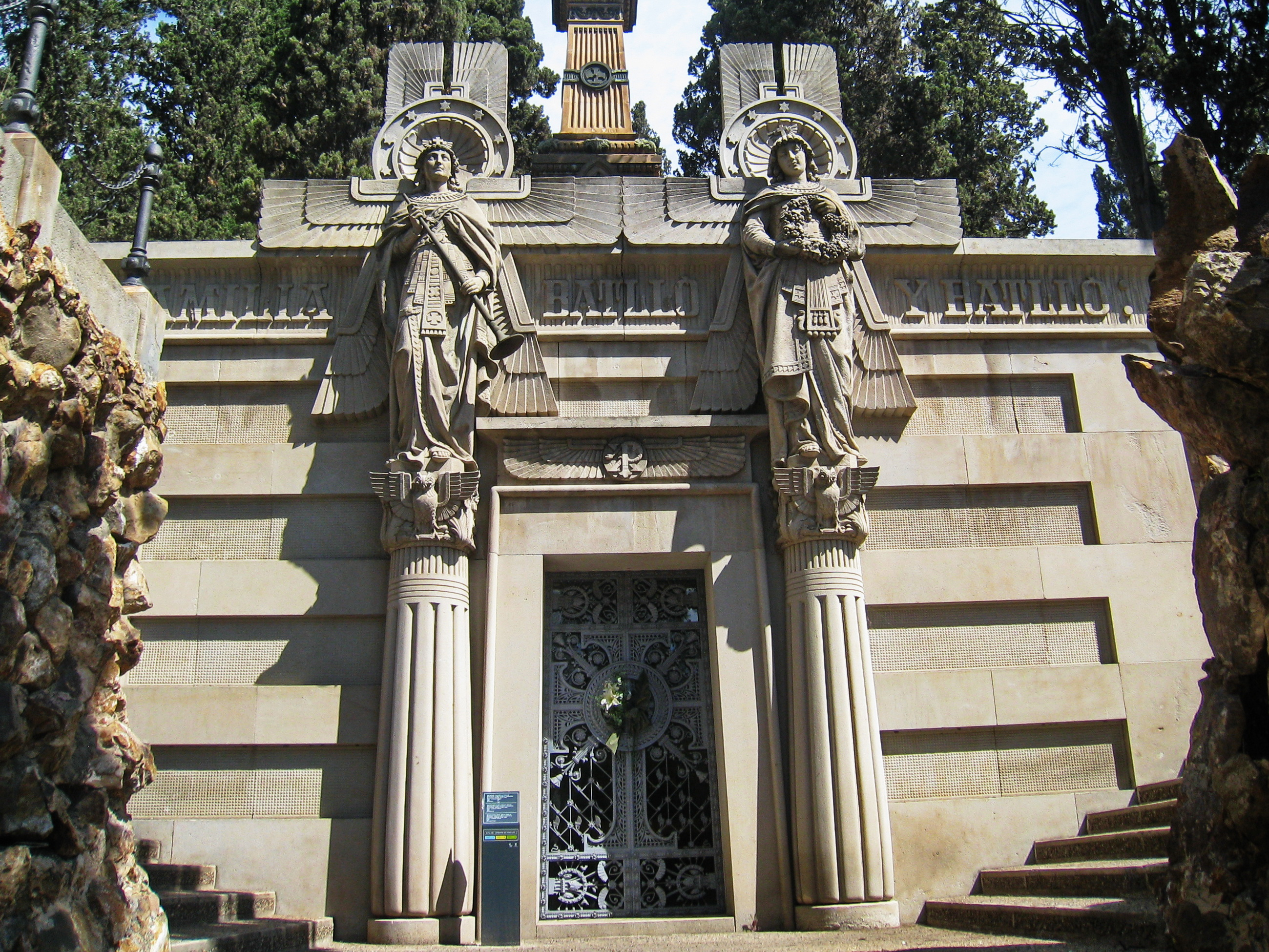 Mausoleu de la família Batlló i Batlló, obra de Josep Vilaseca amb escultures de Manel Fuxà (1889)